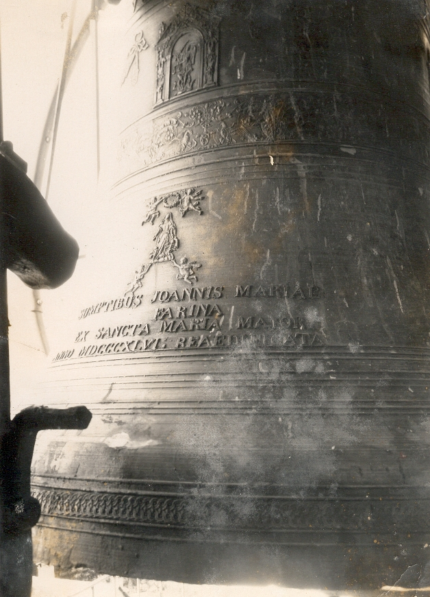 Foto made in 1925